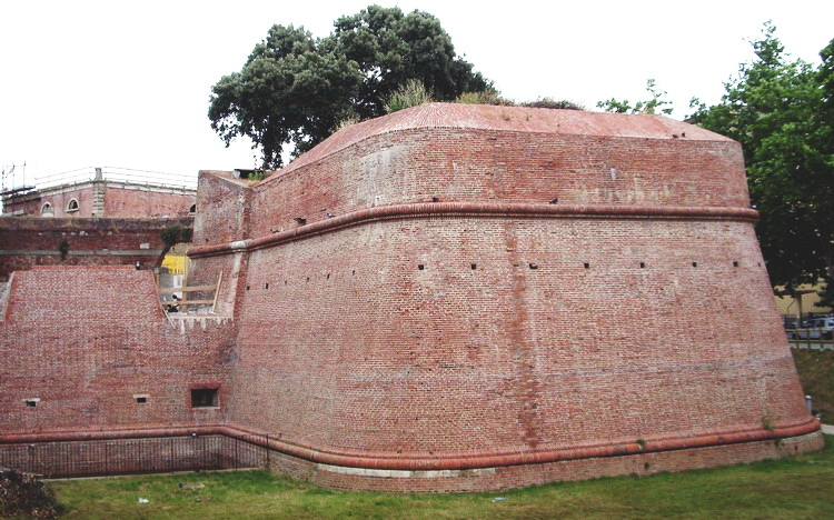 Il complesso del Bastione Maiano lungo le Mura di Grosseto, Tuscany (Italy)